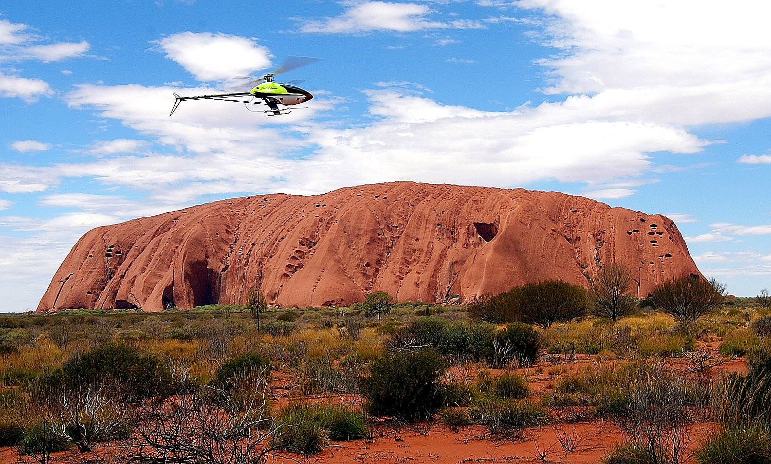 World Scenic Flights in Australia - World Scenic Flights Kulisse Ayers Rock